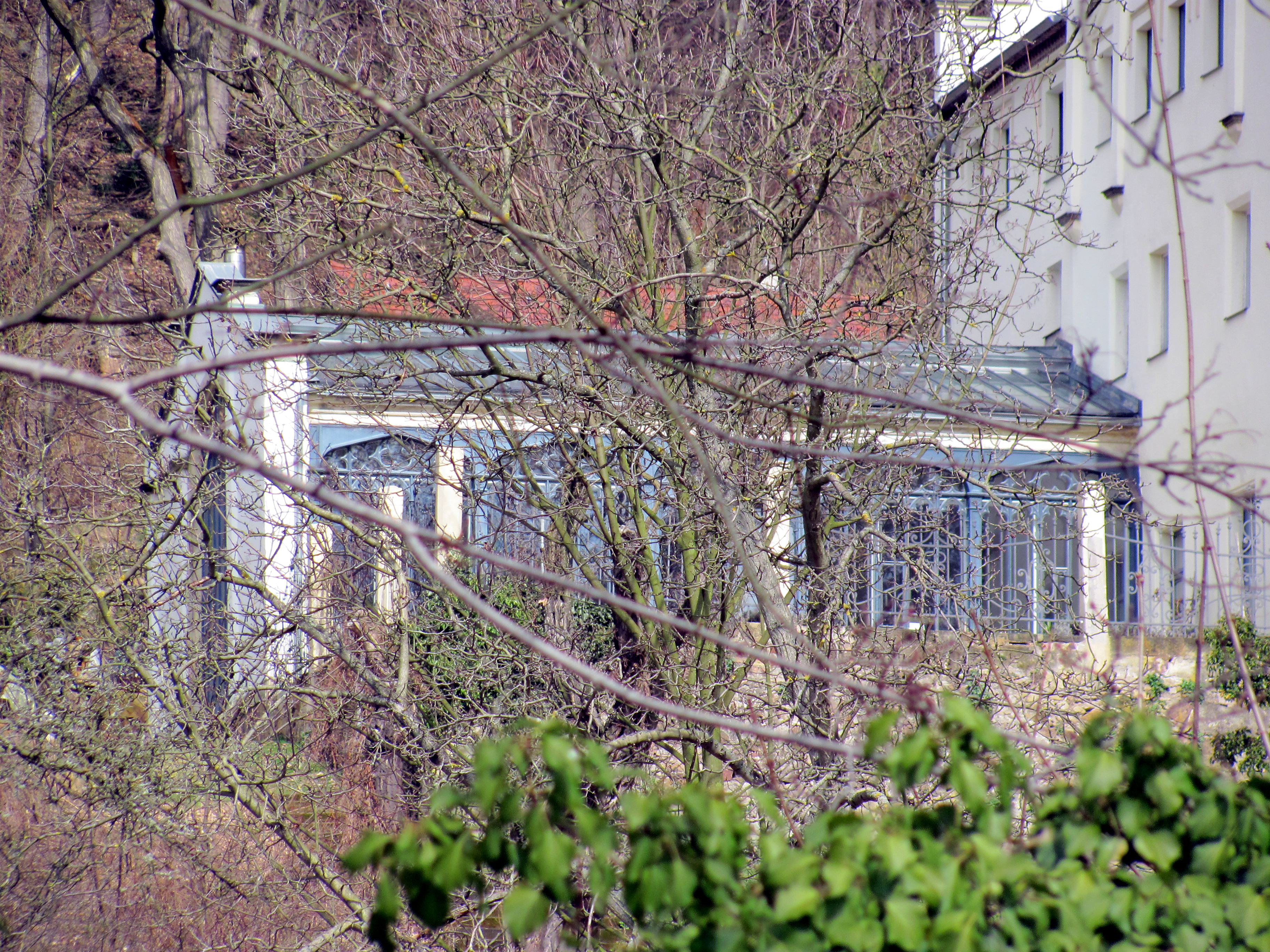 Radebeul-Oberlößnitz, Jägerberg, Wintergarten